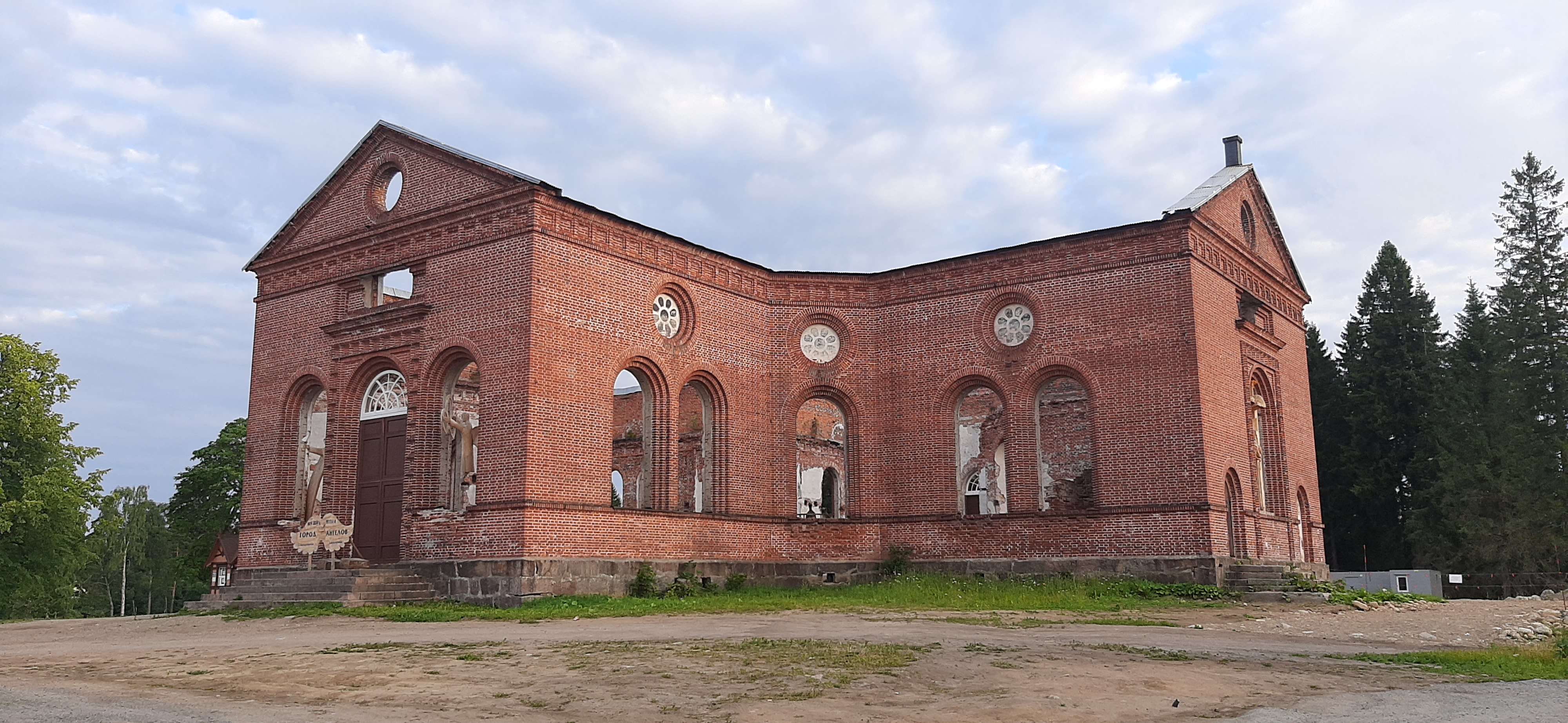 Кирха Яккима, 2020 год